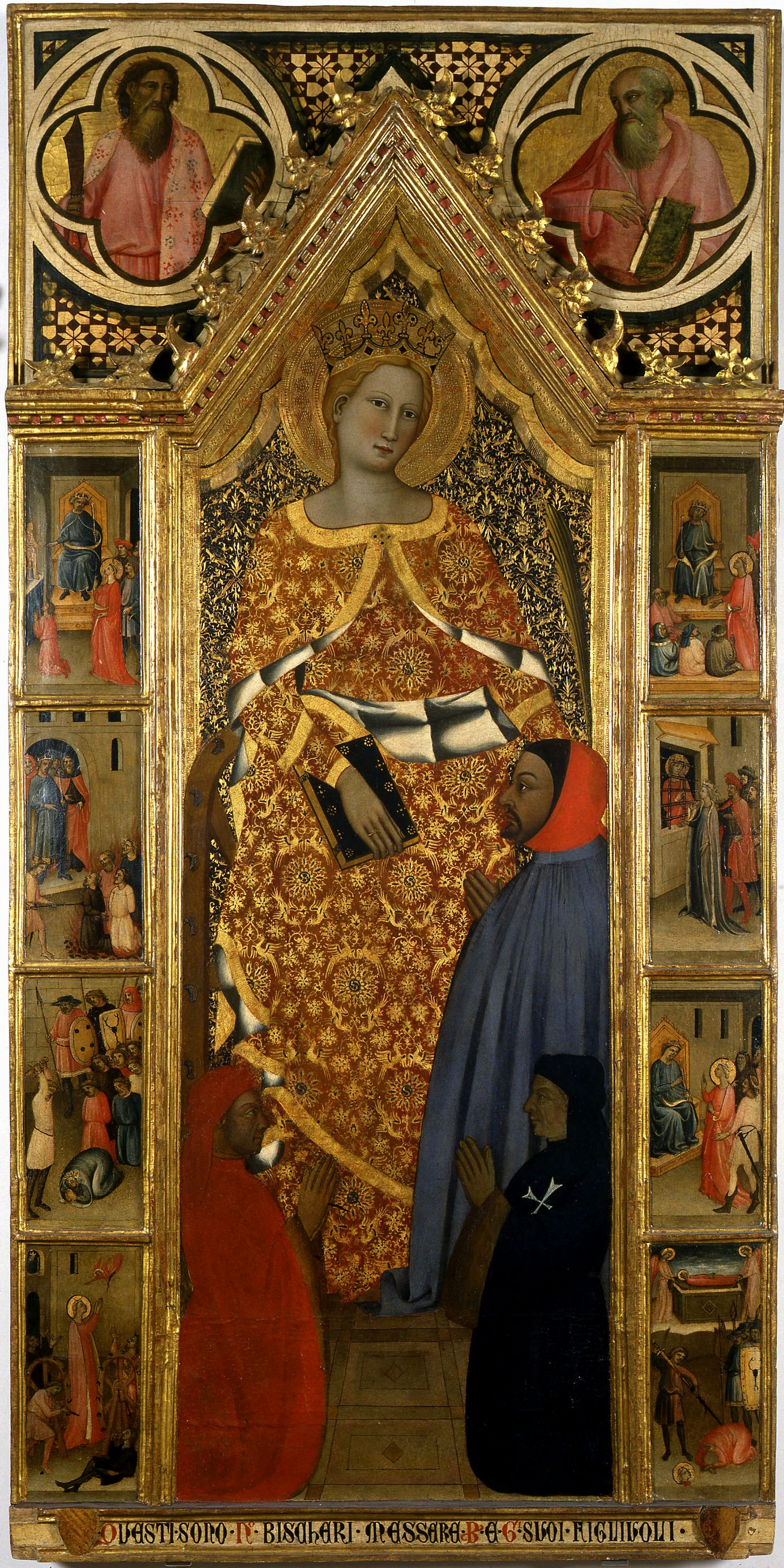 Opera del duomo (FI), Giovanni del Biondo, santa caterina d'alessandria e storie della sua vita, sceonda metà Trecento (con aggiunte di Giovanni dal Ponte inizi XV sec)